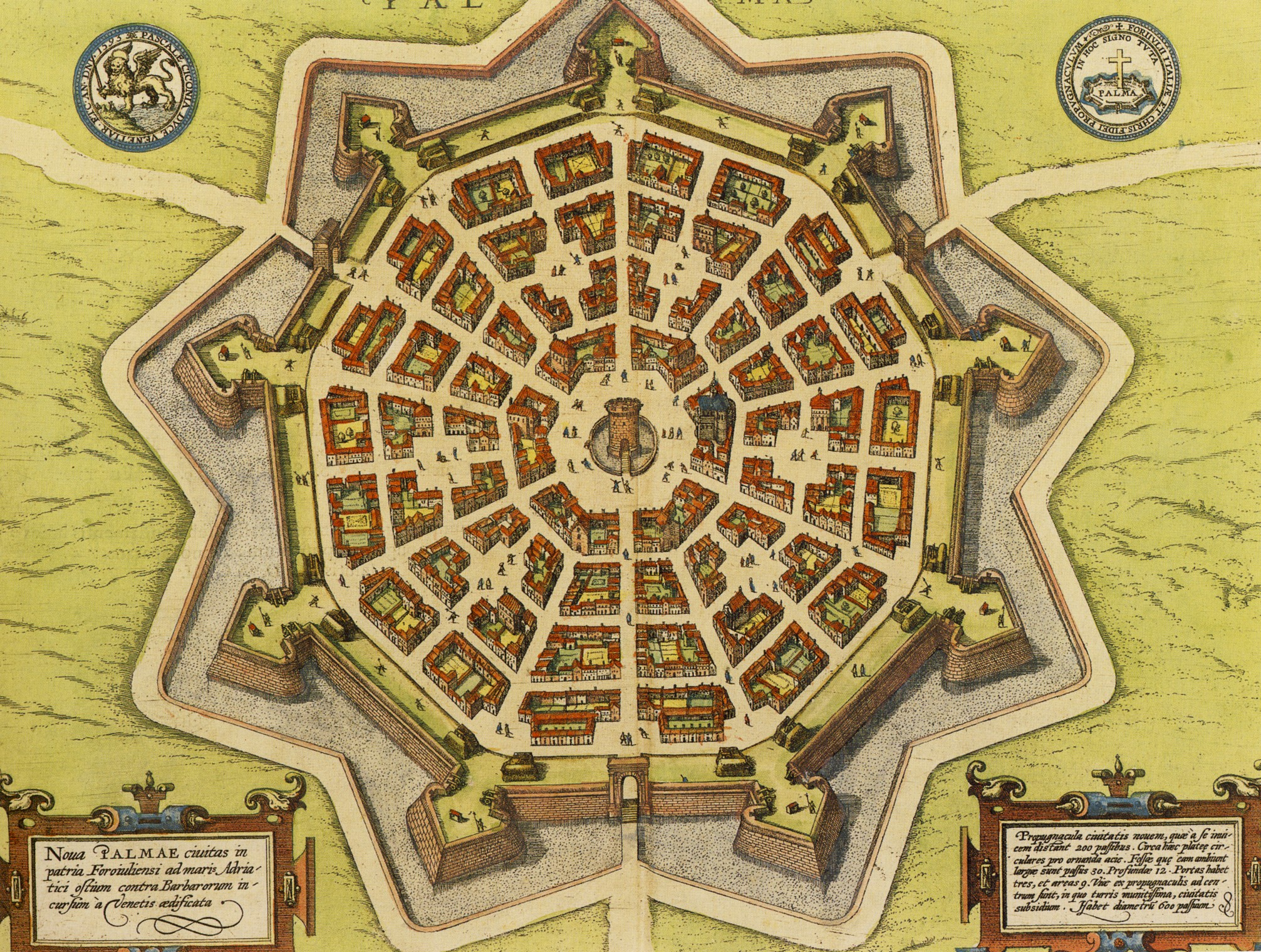 Den venetianiska modellstaden Palmanova ur Georg Braun & Frantz Hogenberg